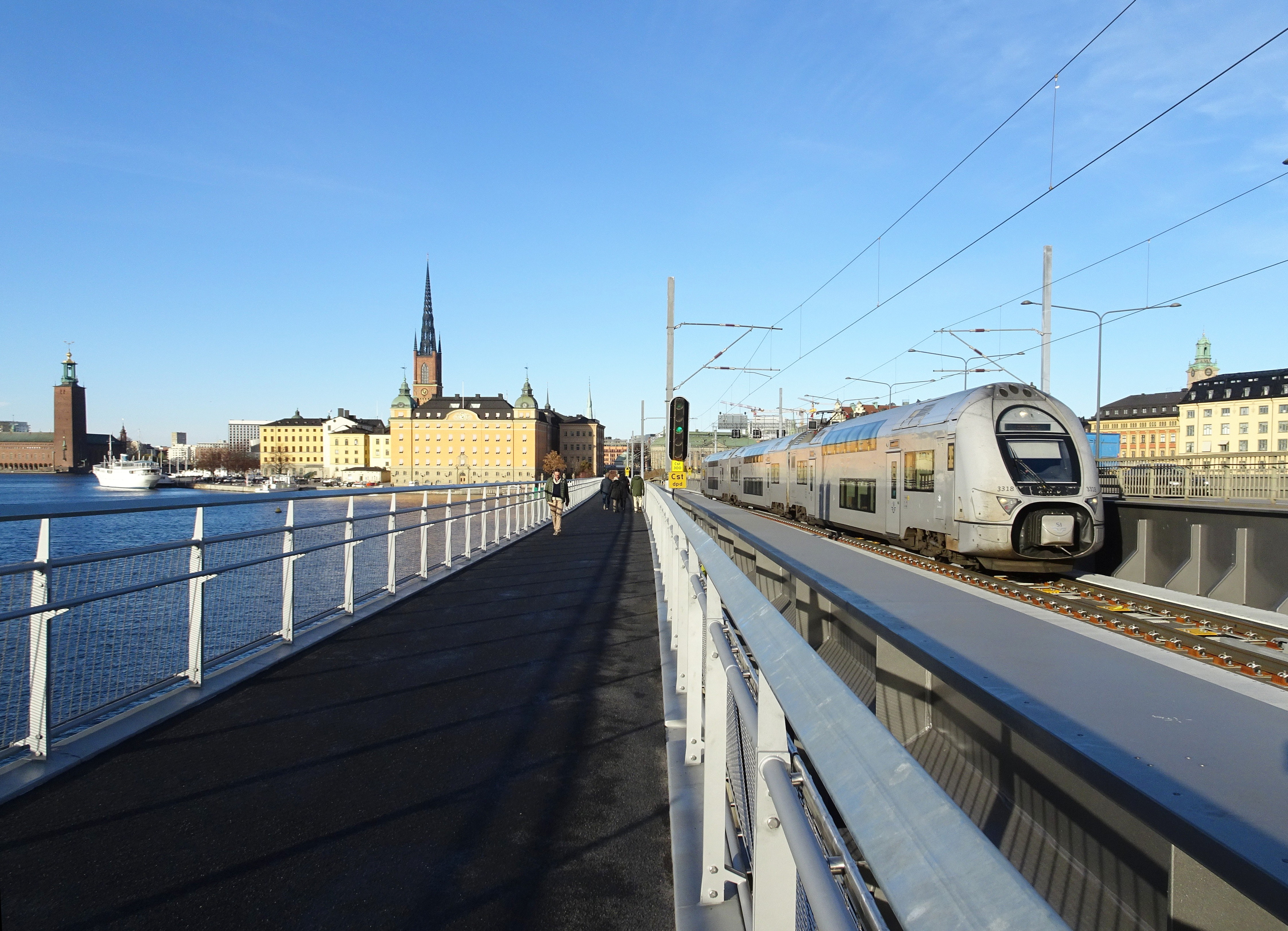 Nya sammanbindningsbanans södra gång- och cykelbron